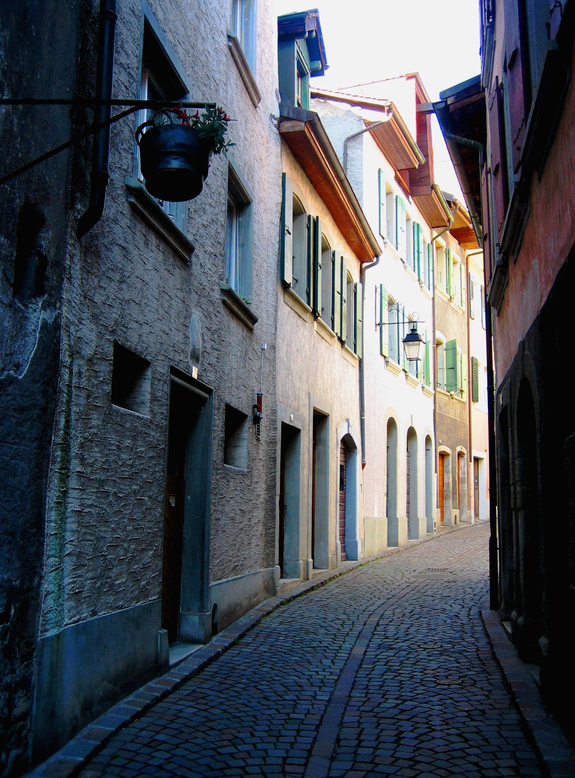 better On Black